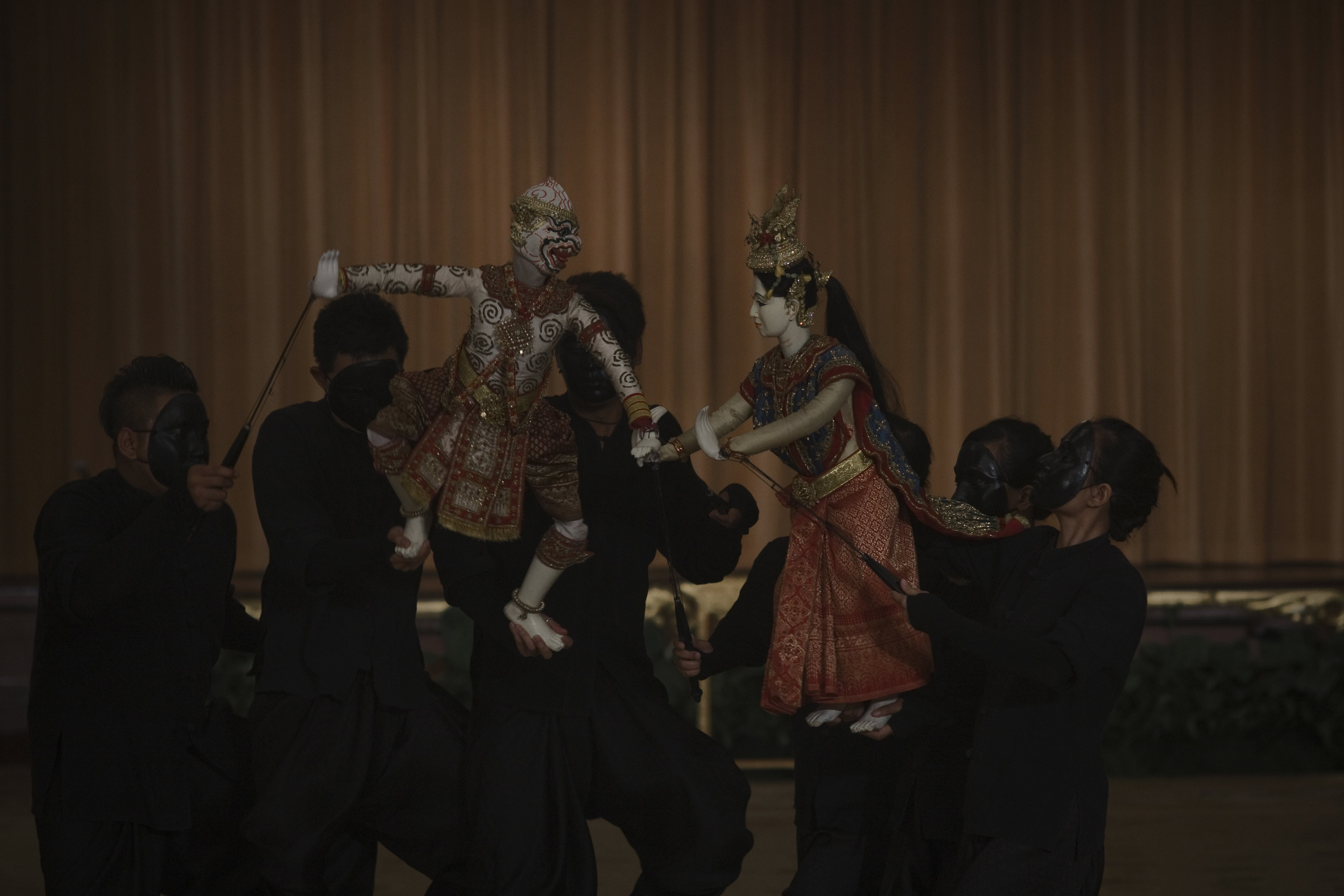 รัฐบาลเป็นเจ้าภาพเลี้ยงอาหารกลางวันแก่ H.E.Ms.Quentin Bryce AC ผู้สำเร็จราชการแห่งเครือรัฐออสเตรเลียพร้อมด้วยคู่สมรส ณ ตึกสันติไมตรีหลังนอก ทำเนียบรัฐบาล วันเสาร์ ที่ 23 เมษายน พ.ศ.2554 (Photographer attached to the Prime Minister of the Kingdom of Thailand (H.E.Mr.Abhisit Vejjajiva) : Peerapat Wimolrungkarat / พีรพัฒน์ วิมลรังครัตน์) @is50mm